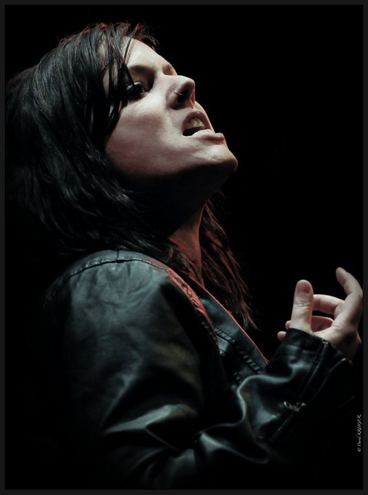 live ecoute s'il pleut